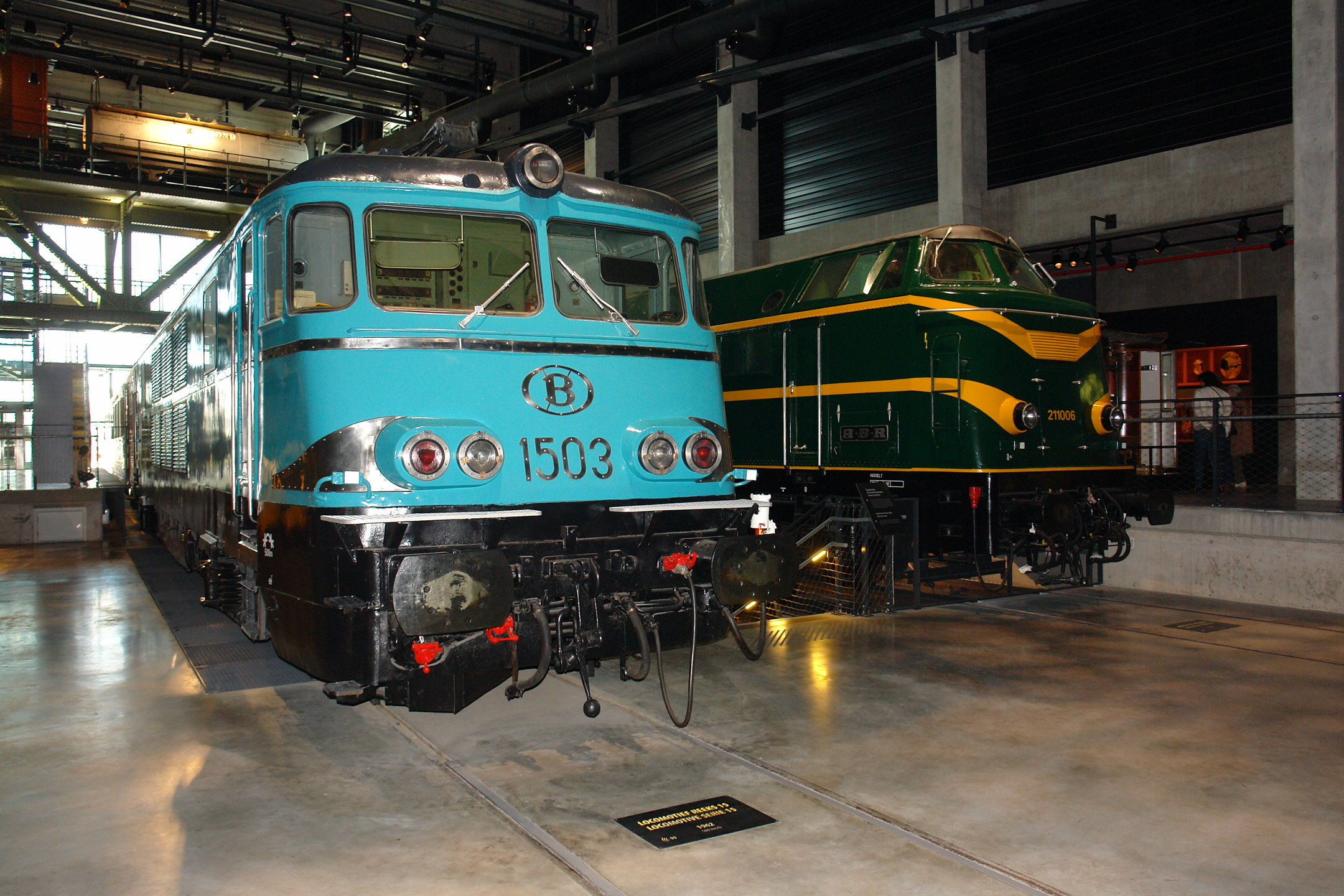 Train World, the railway museum in Brussels